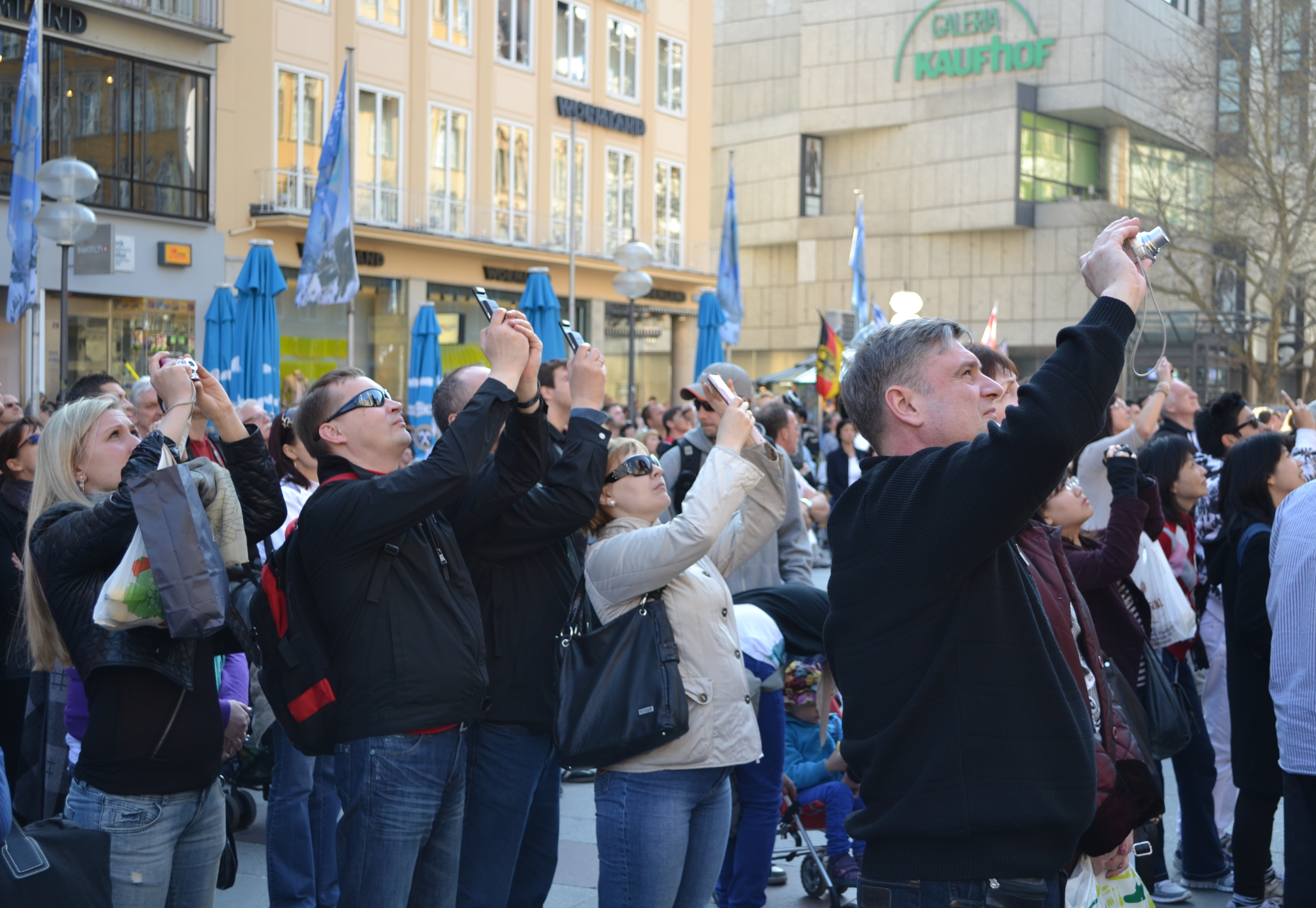 Touristen in München filmen und fotografieren das Glockenspiel des Neuen Rathauses.